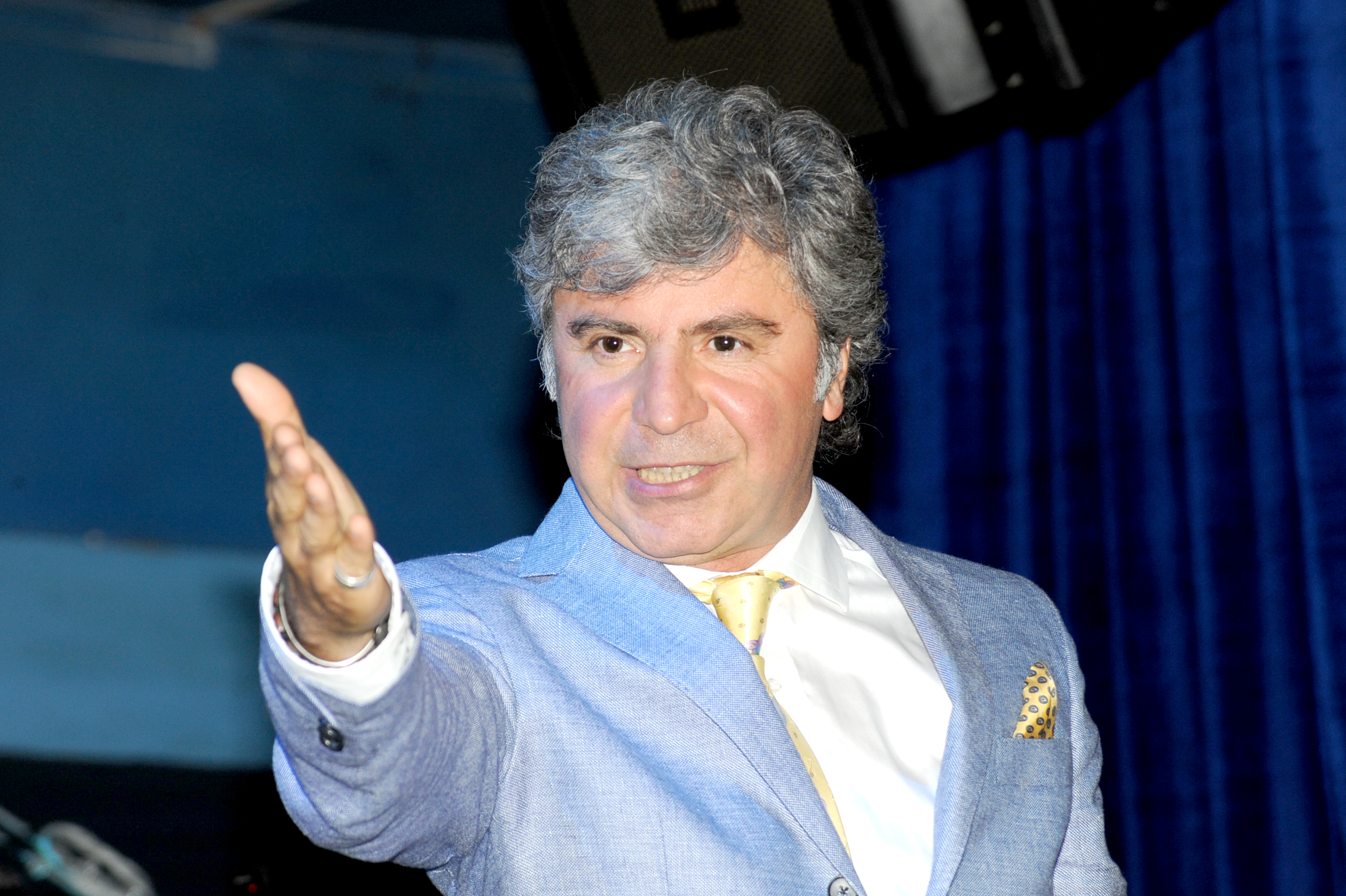 Павлиашви́ли Сосо VADIM CHUPRINA 2011